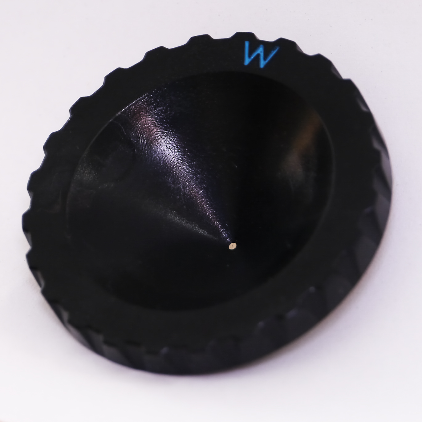 Bajonettadapter für eine Micro-Four-Thirds-Systemkamera mit einer konischen Vertiefung, in der sich eine Lochblende befindet, die aus einer Metallfolie besteht, in die ein Loch mit einem Durchmesser von 0,1 mm hineingeätzt wurde (kleiner schwarzer Punkt).